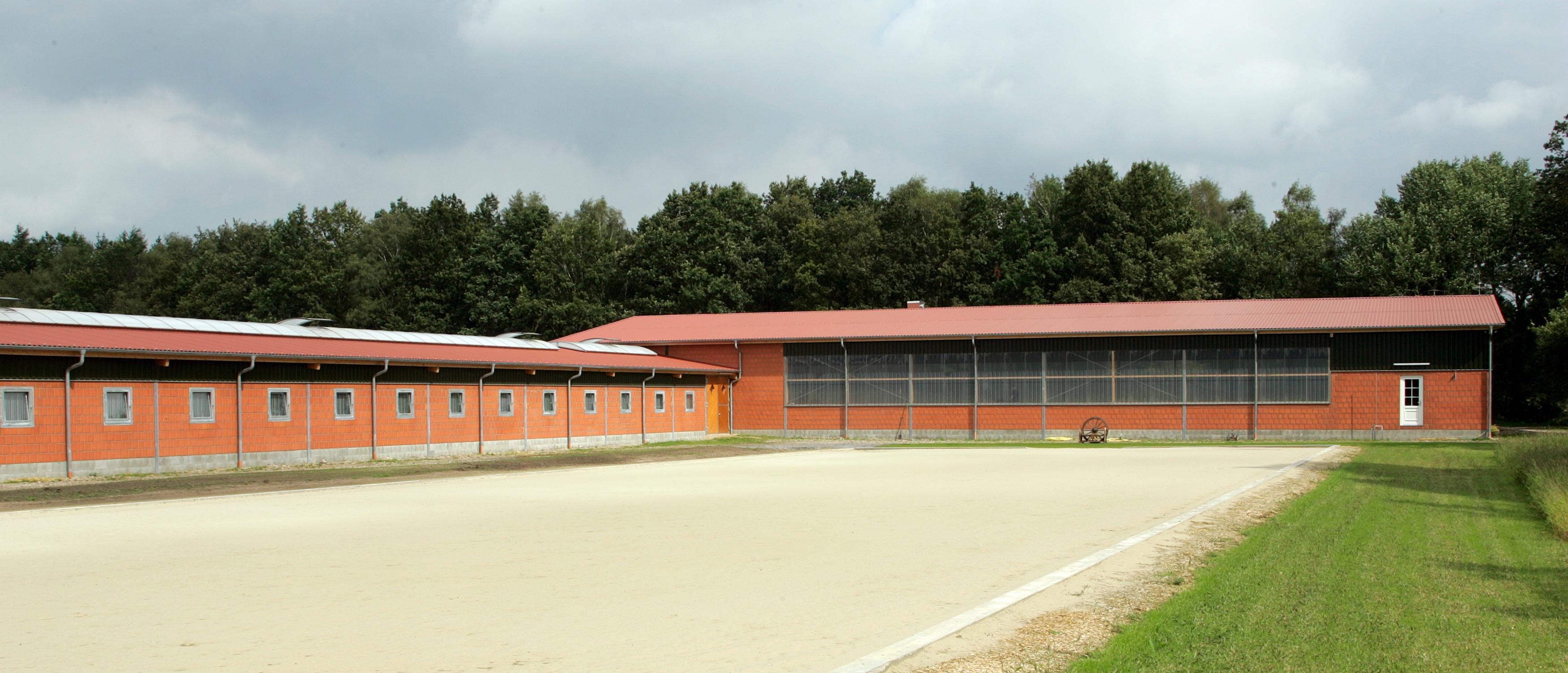 Reitanalge mit Reitplatz (oberflächenentwässert)